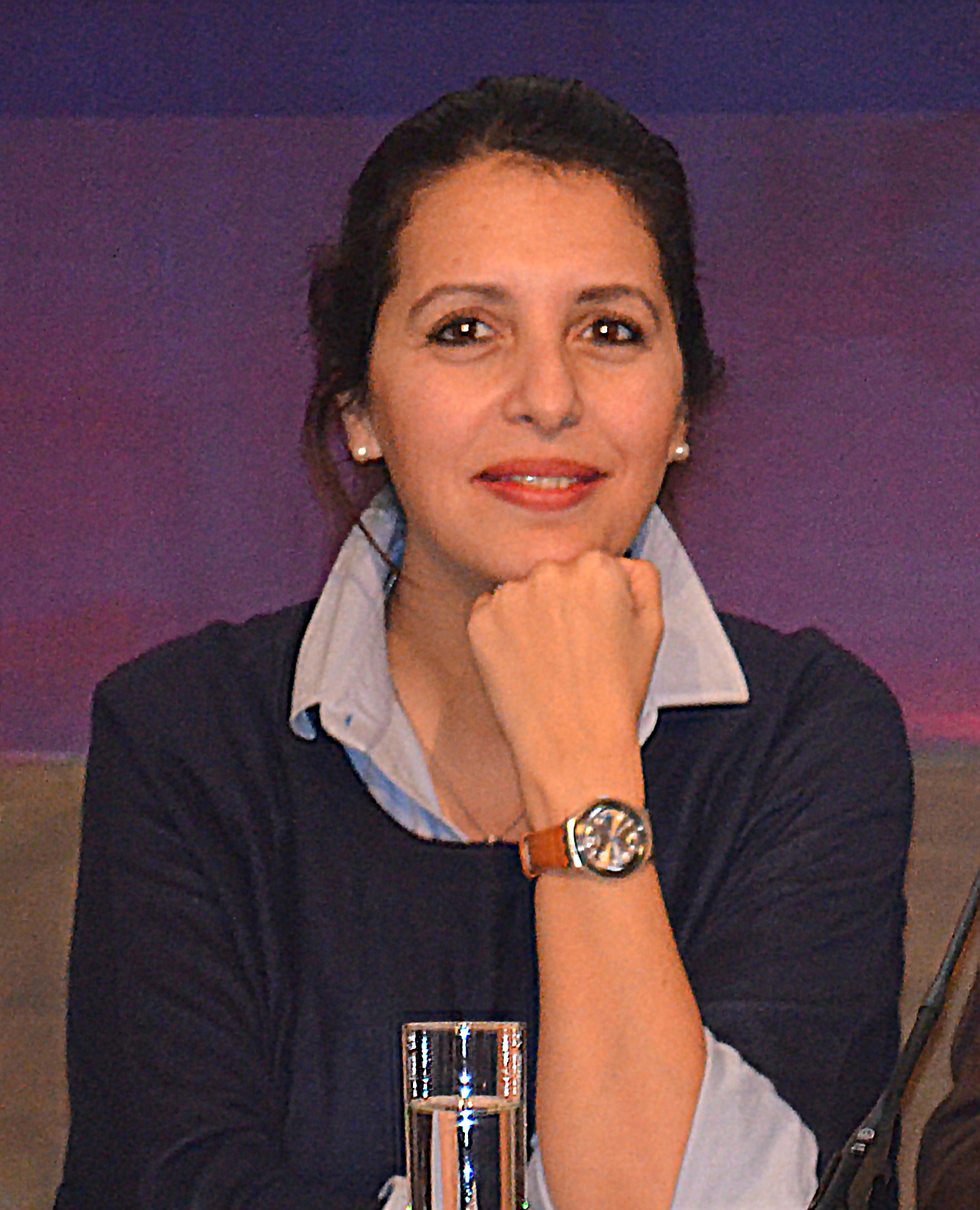 Zakia Khattabi, femme politique écologiste belge, en 2015